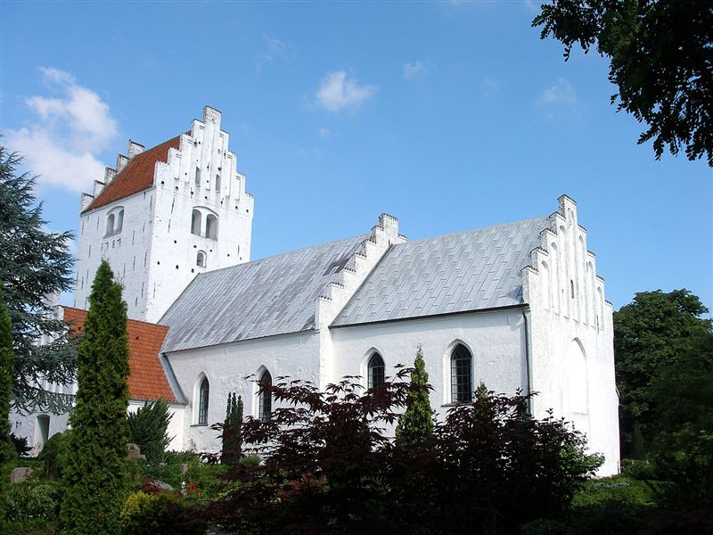 Vig Kirke i Danmark. Vig kirke